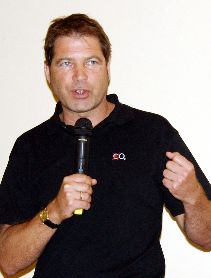 Axel Berg, deutscher Politiker (SPD), auf einer Parteiveranstaltung in München am 03. Juli 2005